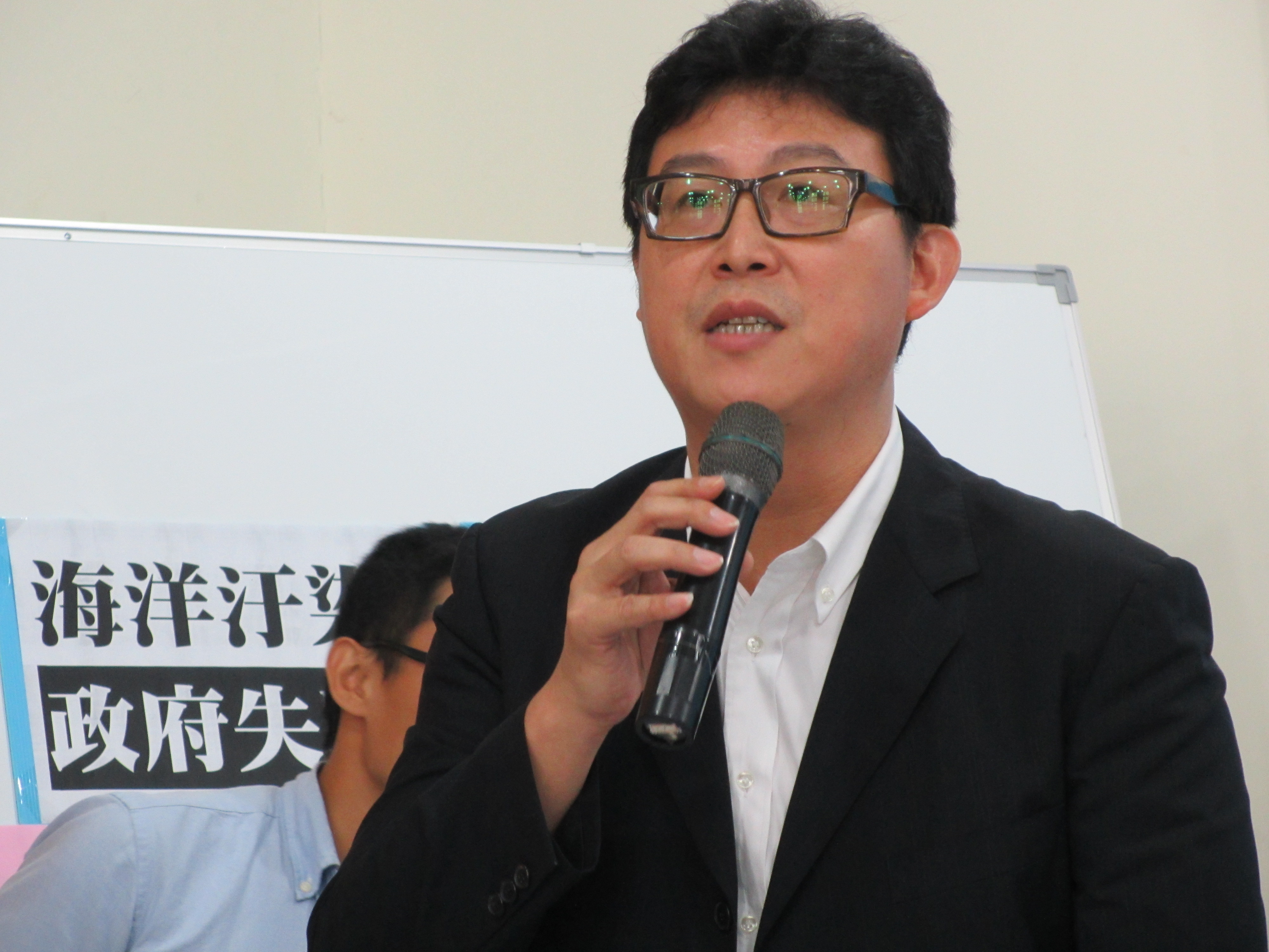 臺北市第二選區立法委員姚文智。